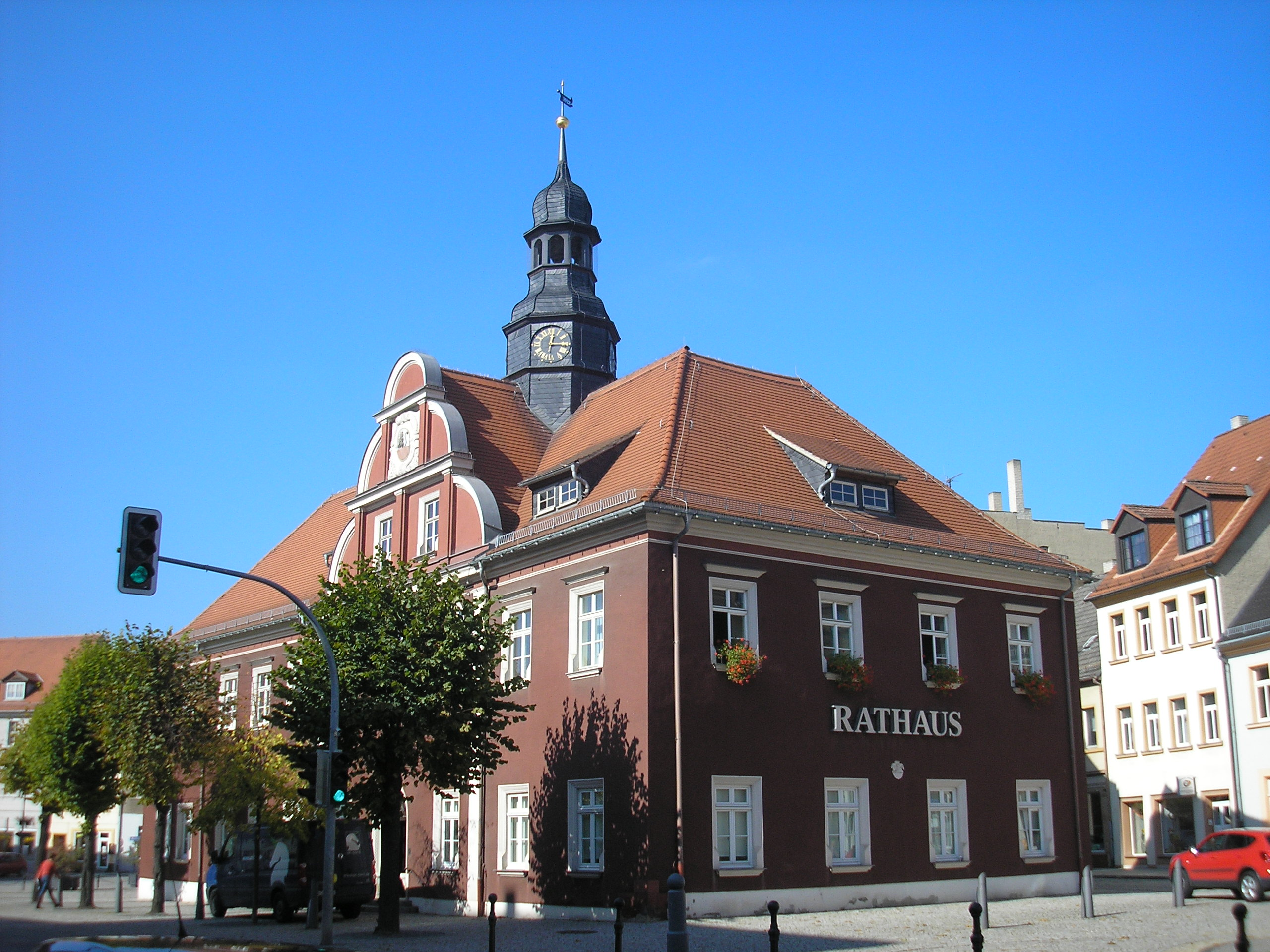 Das Rathaus in Ronneburg (Thüringen).